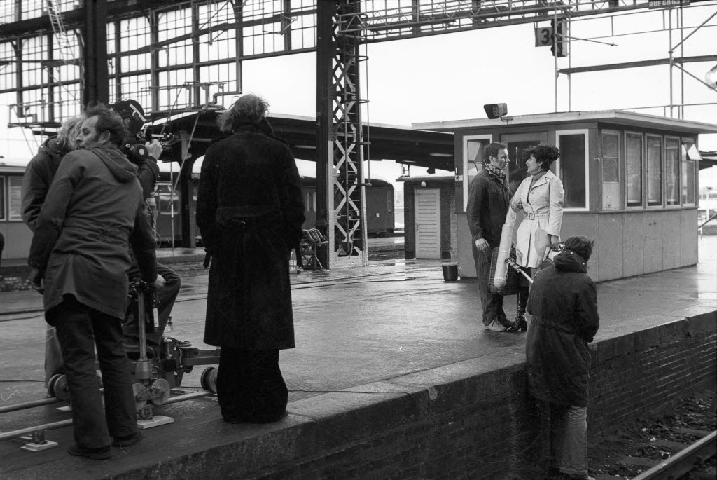 Szenendreh am Bahnsteig 3 des Kieler Hauptbahnhofs. Im Bild rechts die Schauspieler Dieter Prochnow und Edda Pastor (im hellen Mantel).